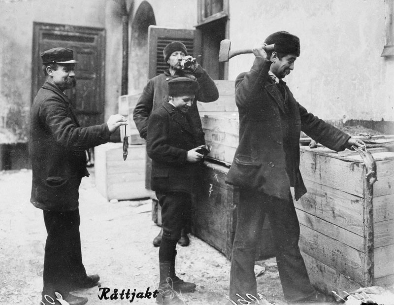 Råttjakt på en bakgård på Norrmalm. För varje uppvisad råttsvans fick råttjägaren 2 öre i början av 1900-talet